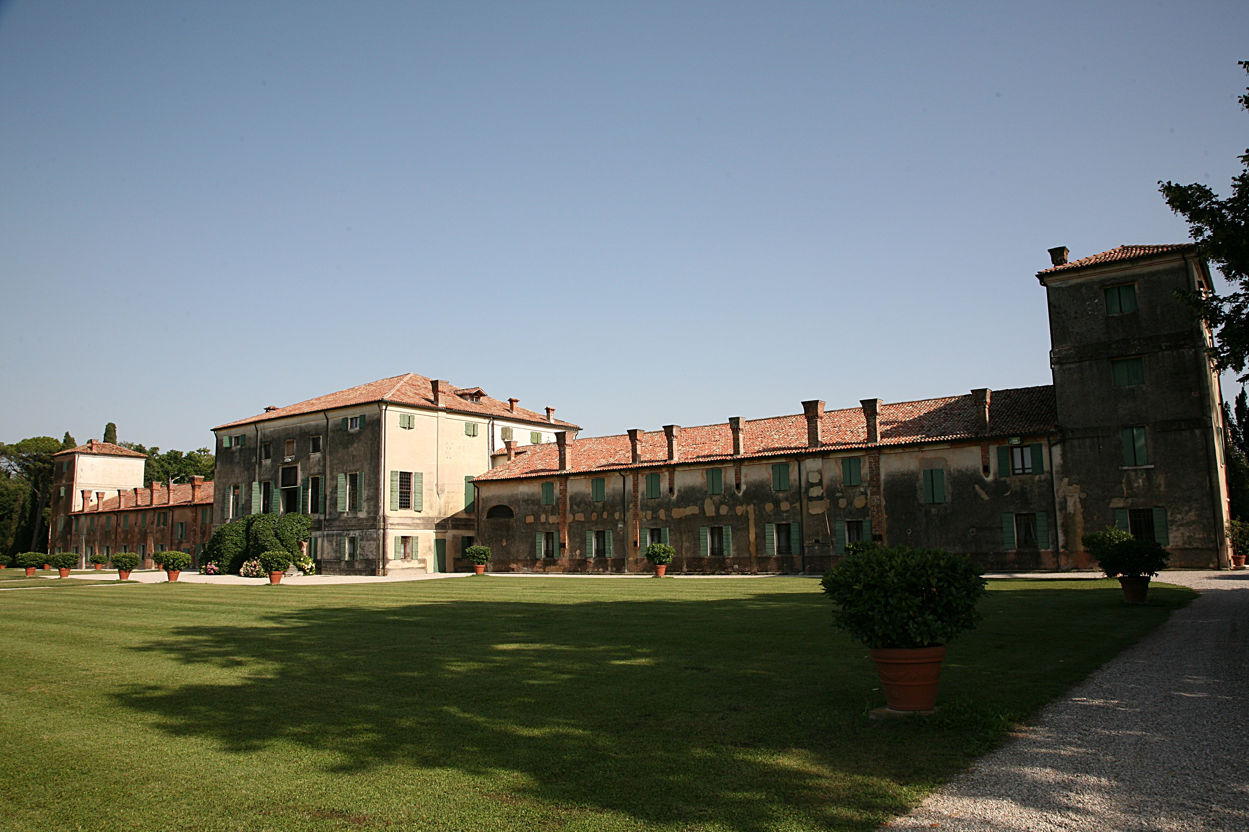 Villa Emo by Andrea Palladio.